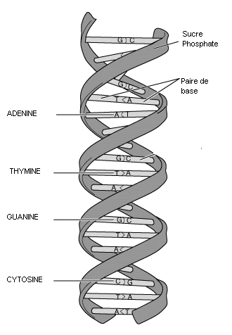 Paire de base dans un chromosome National Human Genome Research